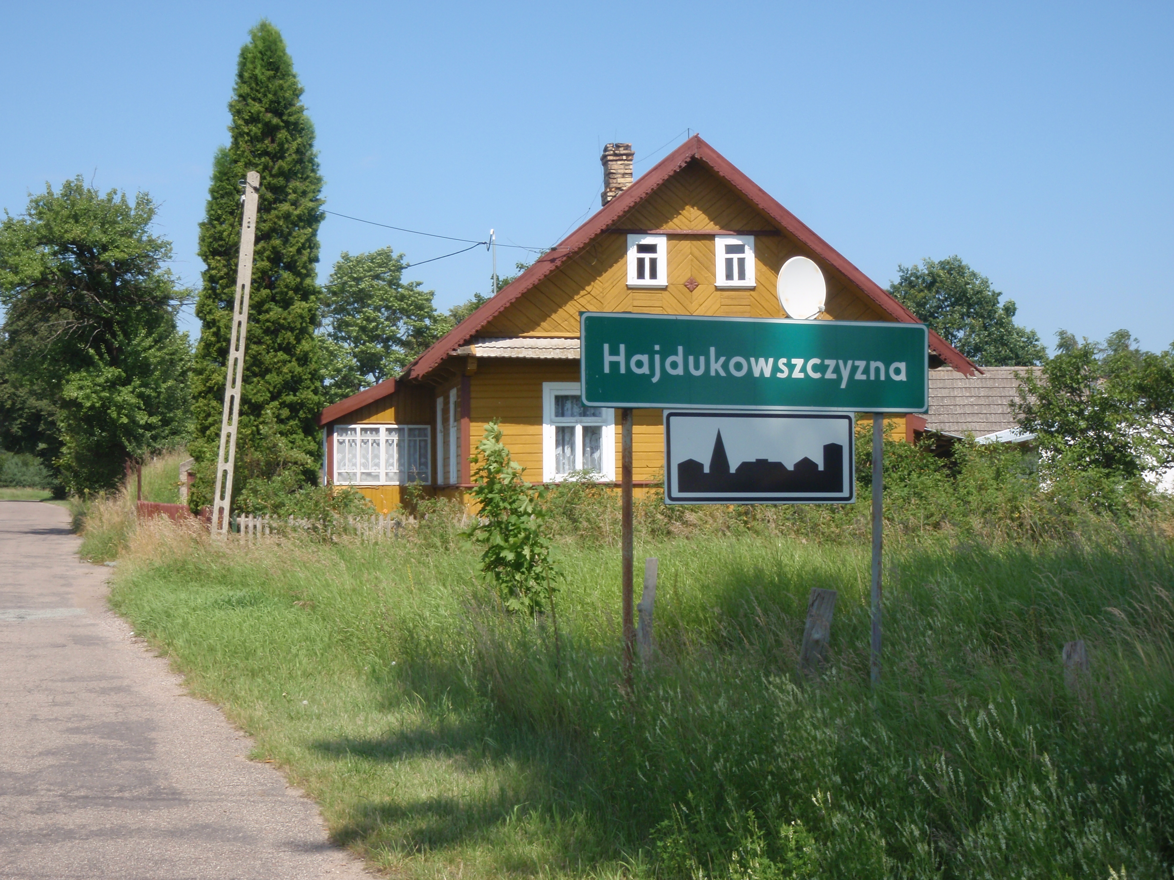 wjazd do wsi Hajdukowszczyzna od strony Makówki